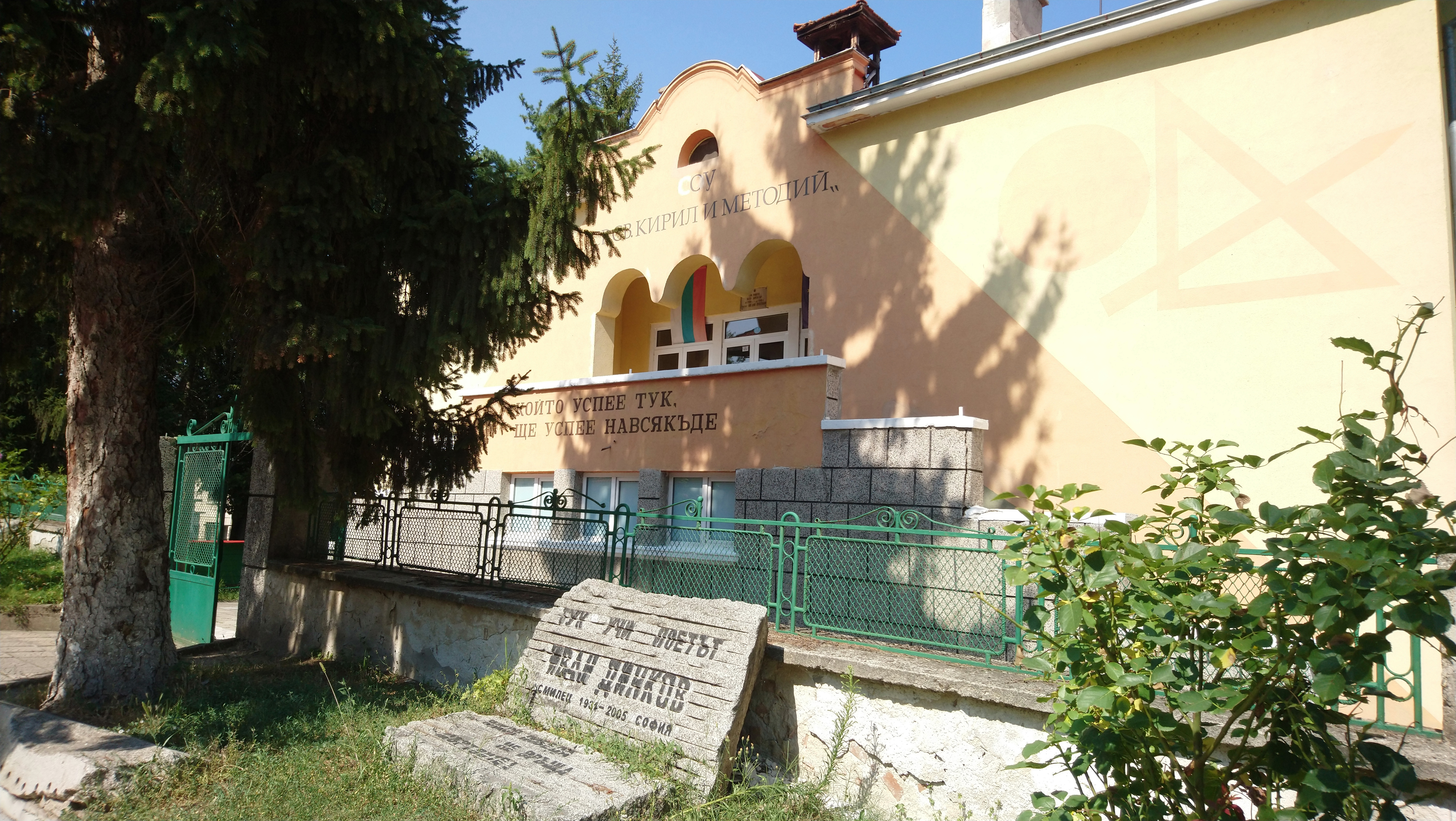 Паметна плоча на поета Иван Динков пред училище Св. Св. Кирил и Методий, Стрелча